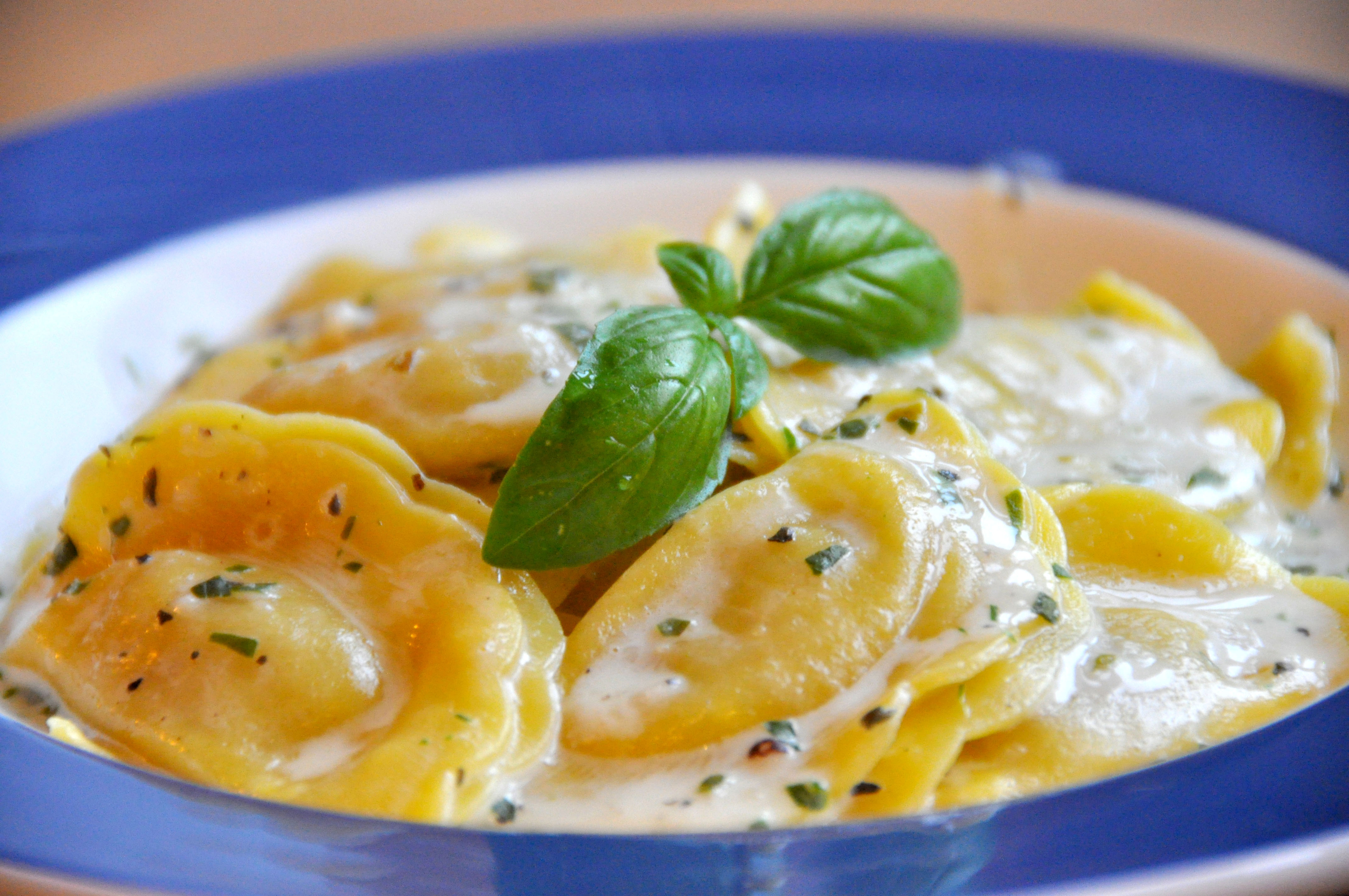 Ravioli med skinke og asparges i mascarponecreme